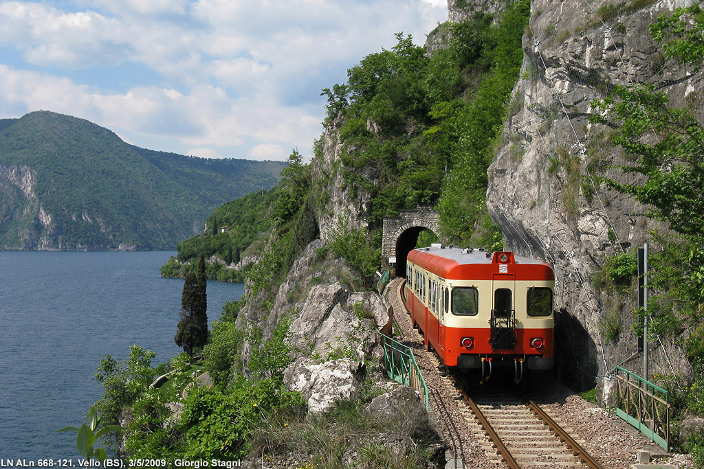 Automotrice ALn 668-121 delle FNM in corsa presso Vello.